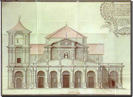 Projeção da igreja de S; Miguel Arcanjo